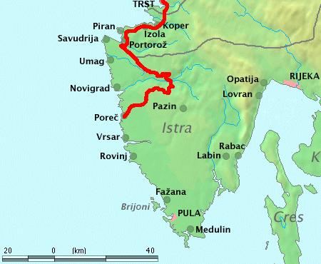 Karta Istre s ucrtanom trasom pruge uskotračne željeznice Parenzane